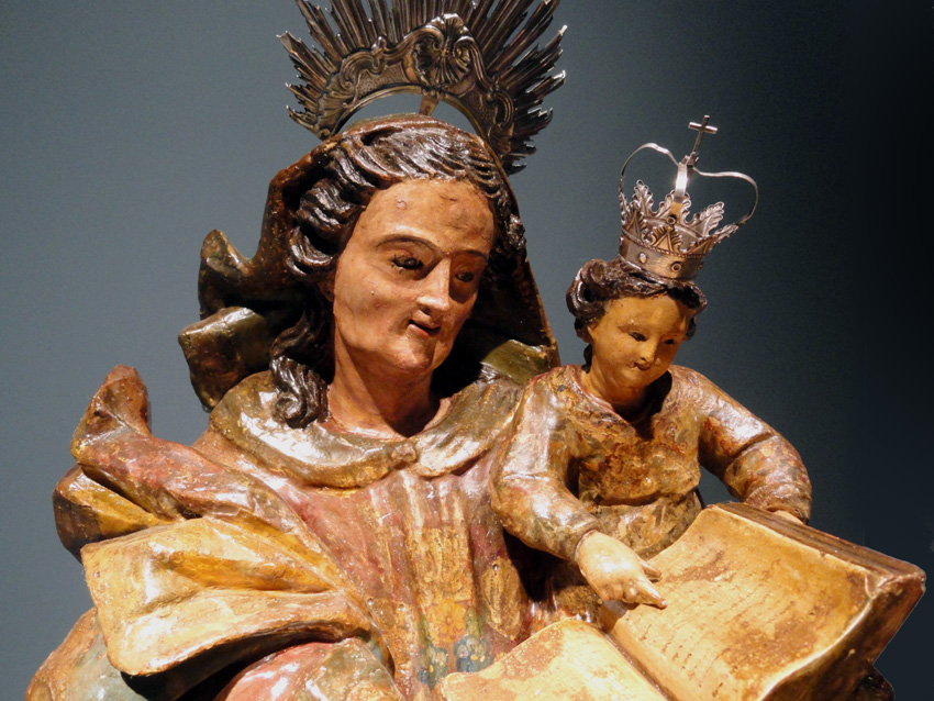 Estatua de Santa Ana com a Virgem Maria menina. Século XVIII, origem mineira. Museu de Sant'Ana, Tiradentes.